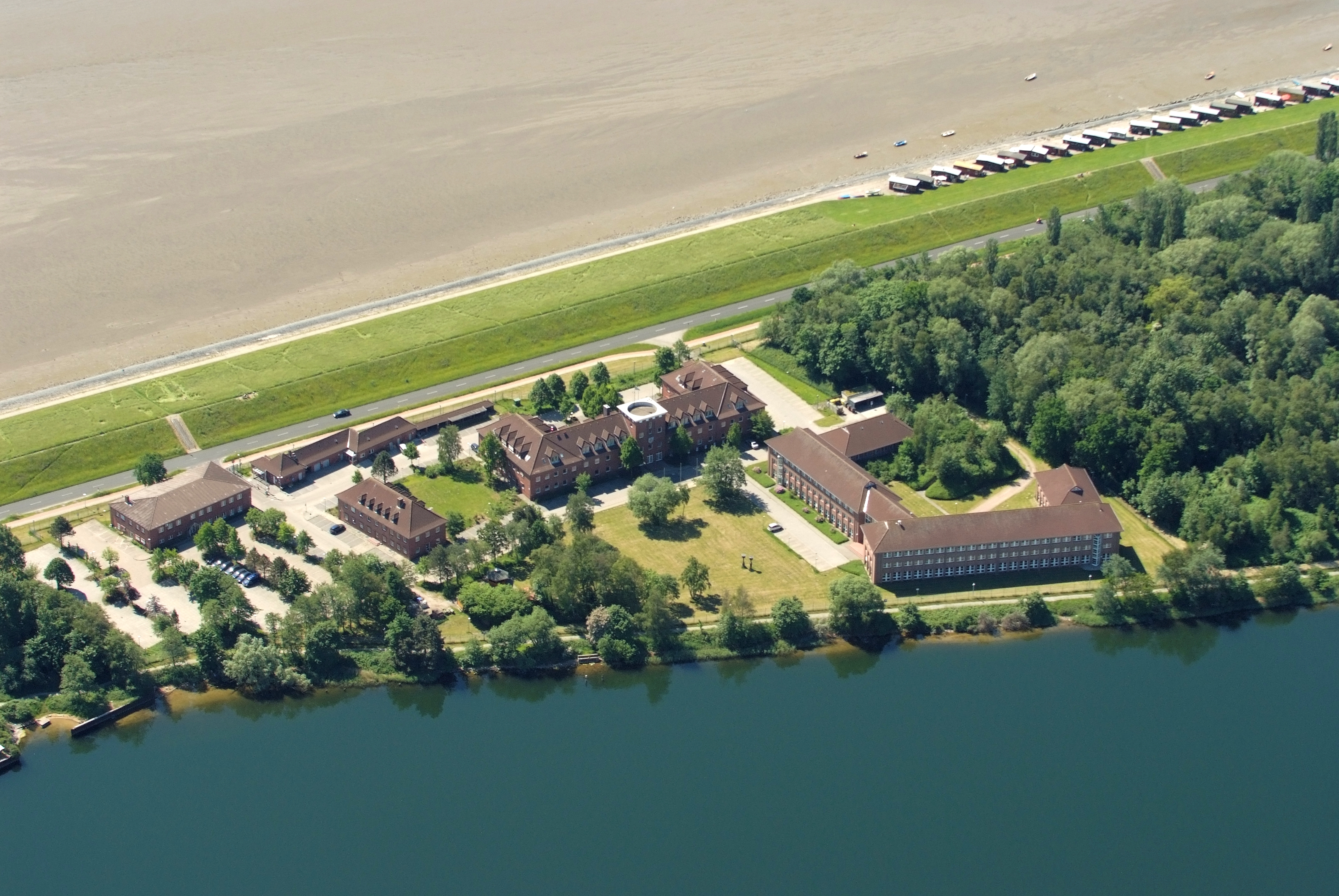 Marineanlage Bordum (Fotoflug vom Flugplatz Nordholz-Spieka über Cuxhaven und Wilhelmshaven)